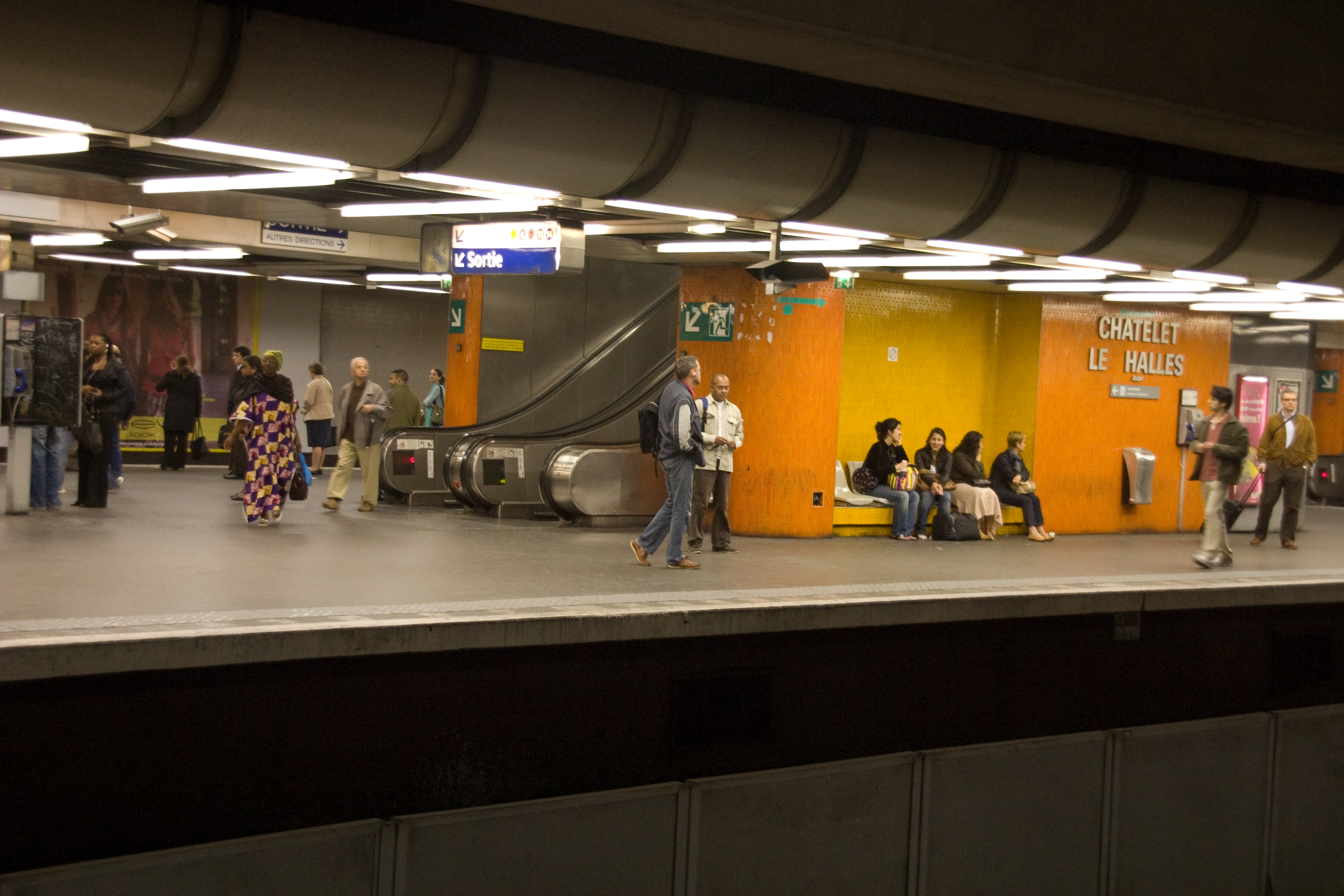 Station Châtelet - Les Halles, Paris, France